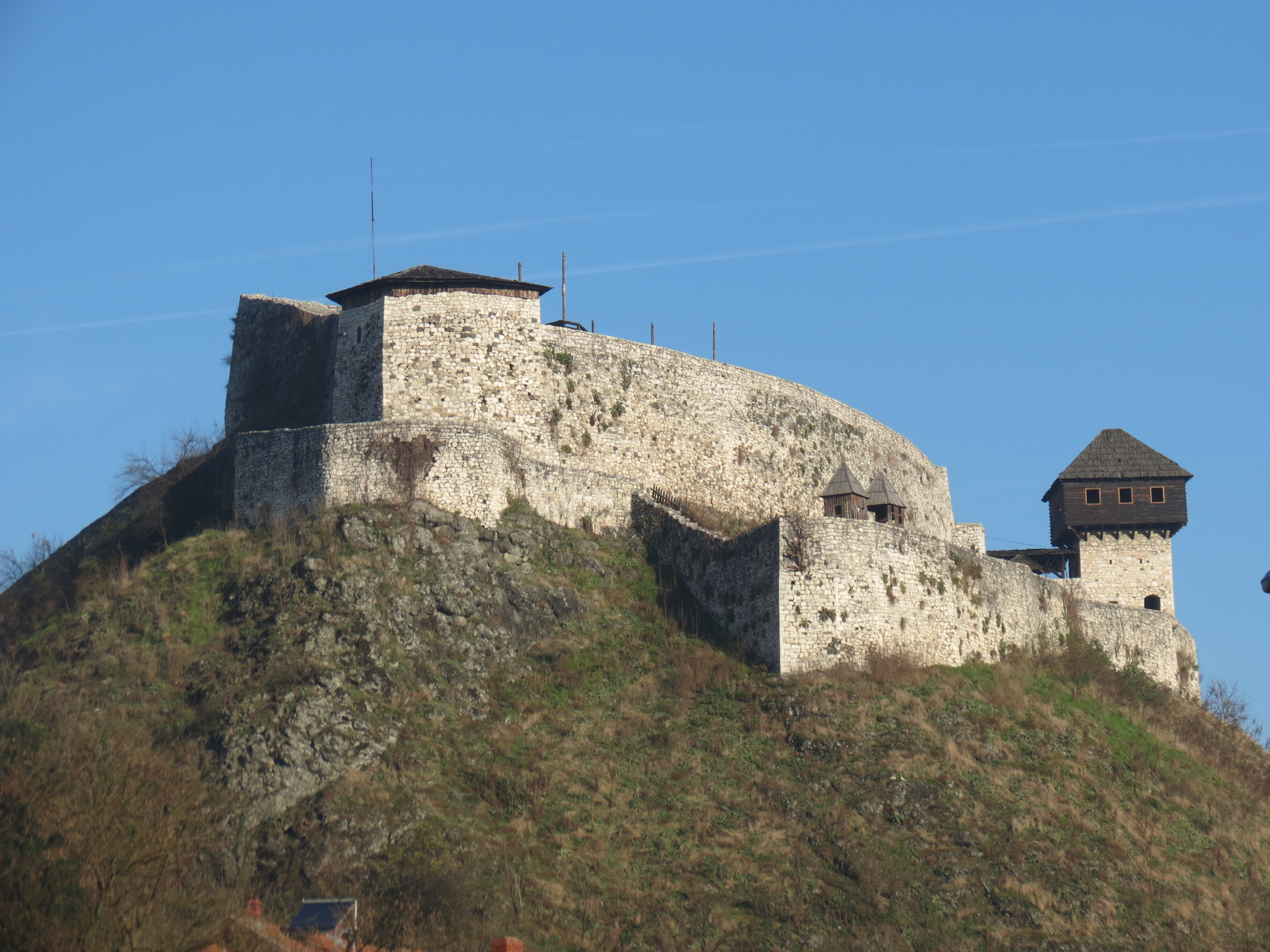 Doboj - Fortress